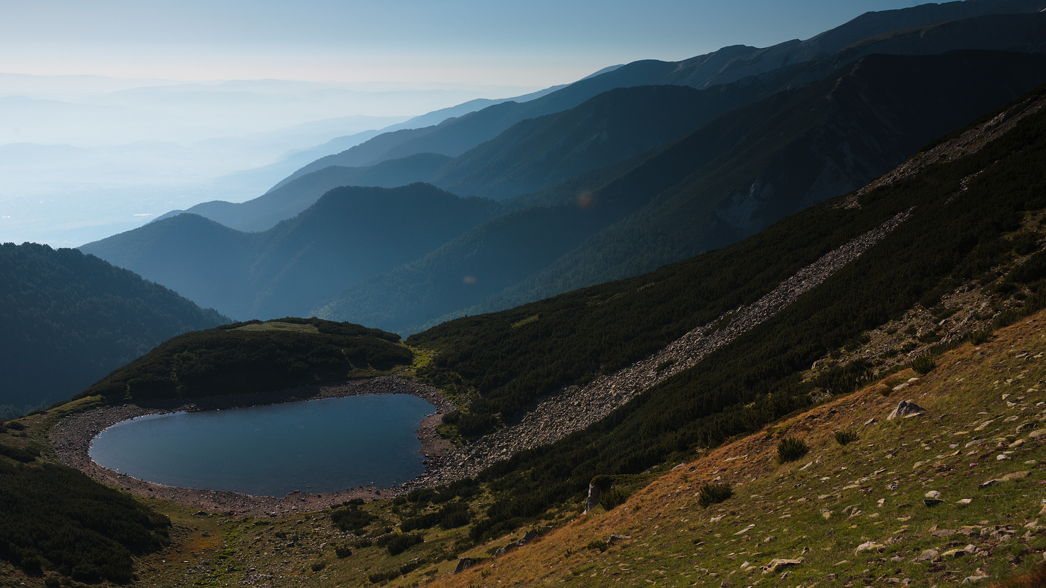 Пирин, Пирин, Даутово езеро